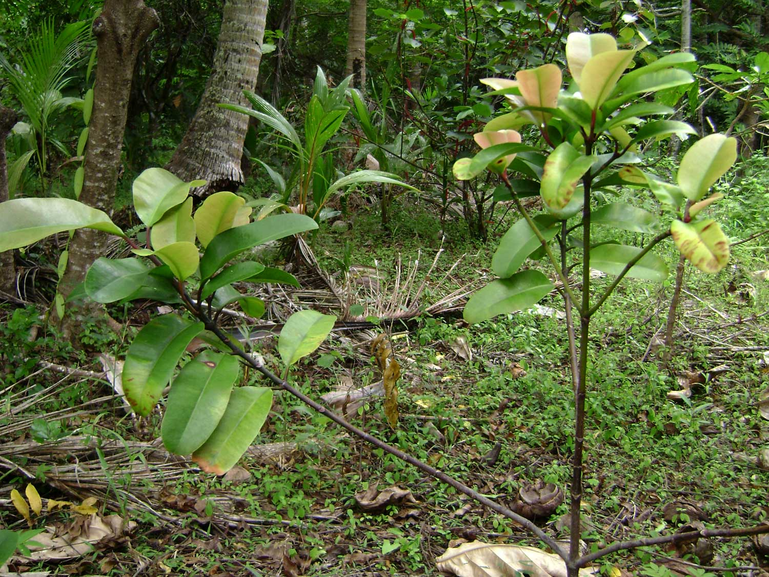 Garcinia pseudoguttifera; (moʻonia) in Vavaʻu, Tonga; ʻEneʻio botanical garden